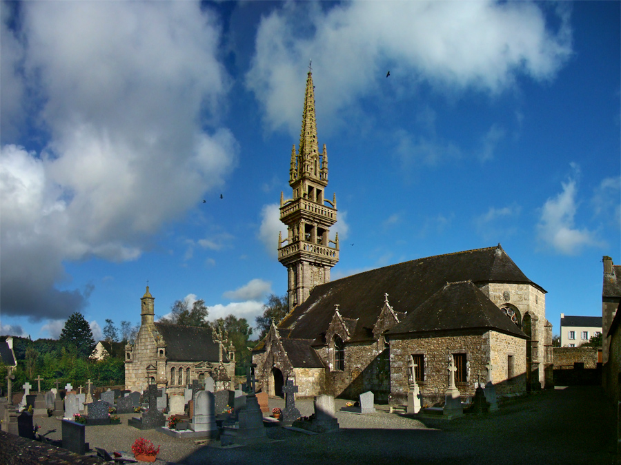 Enclos paroissial, Saint-Servais, Finistère, Bretagne, France.